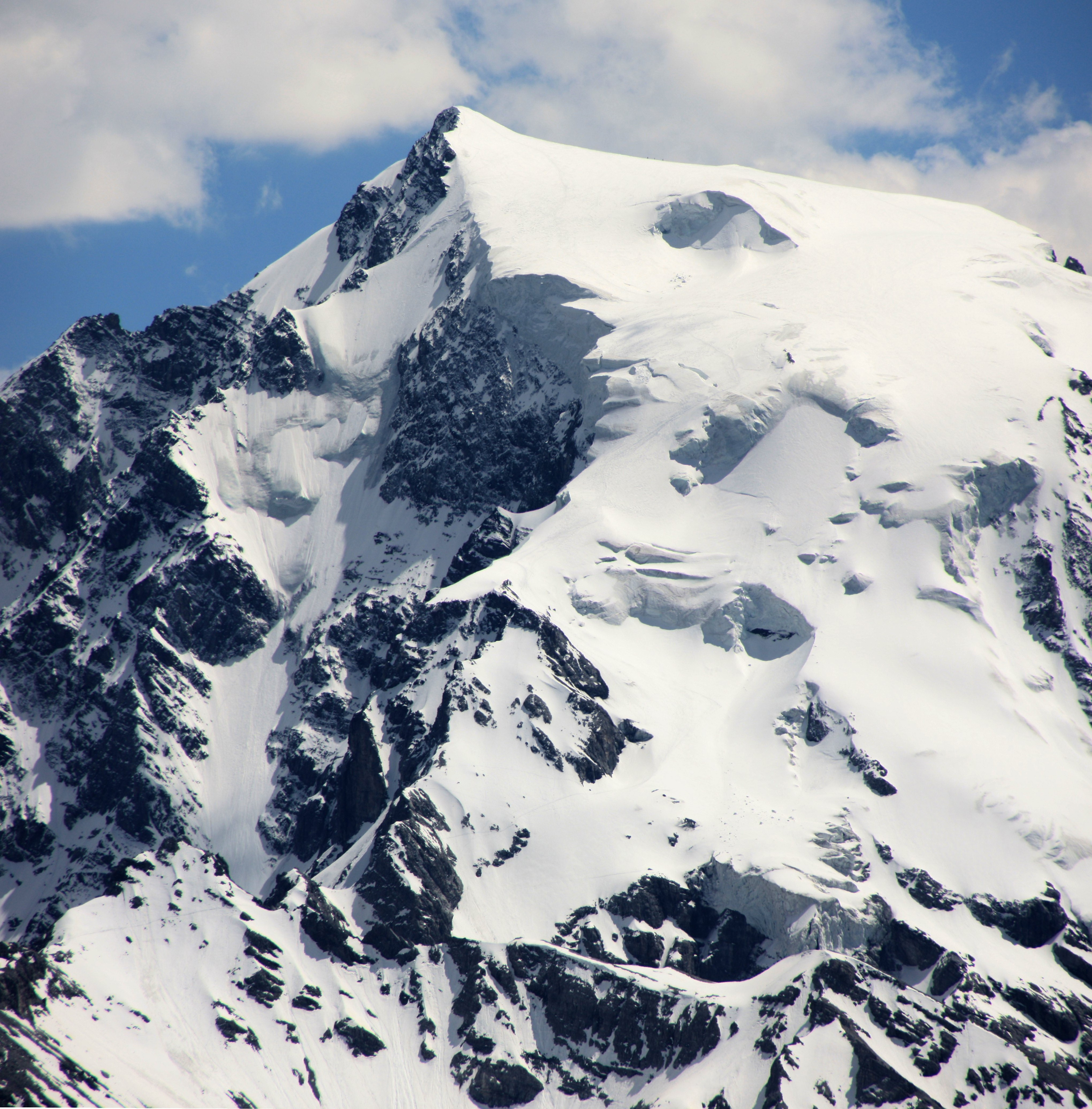 Der Ortler-Nordgrat, über den der Normalanstieg verläuft. in Original-Größe ist deutlich die Aufstiegsspur zu sehen!